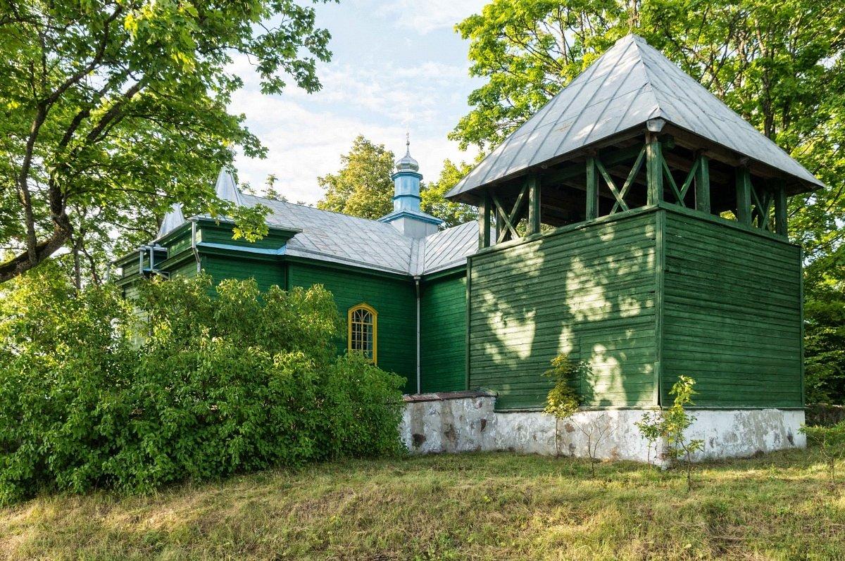 Кавалі. Свята-Успенская царква і званіца